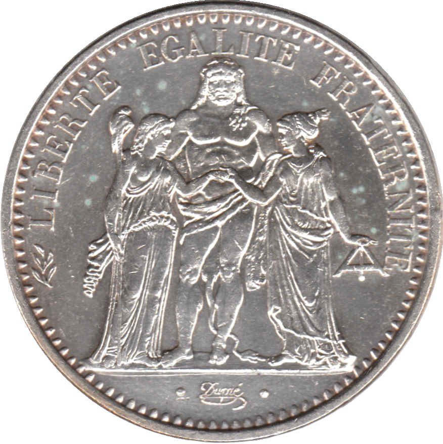 avers d'une pièce de 10 Francs Dupré 1965